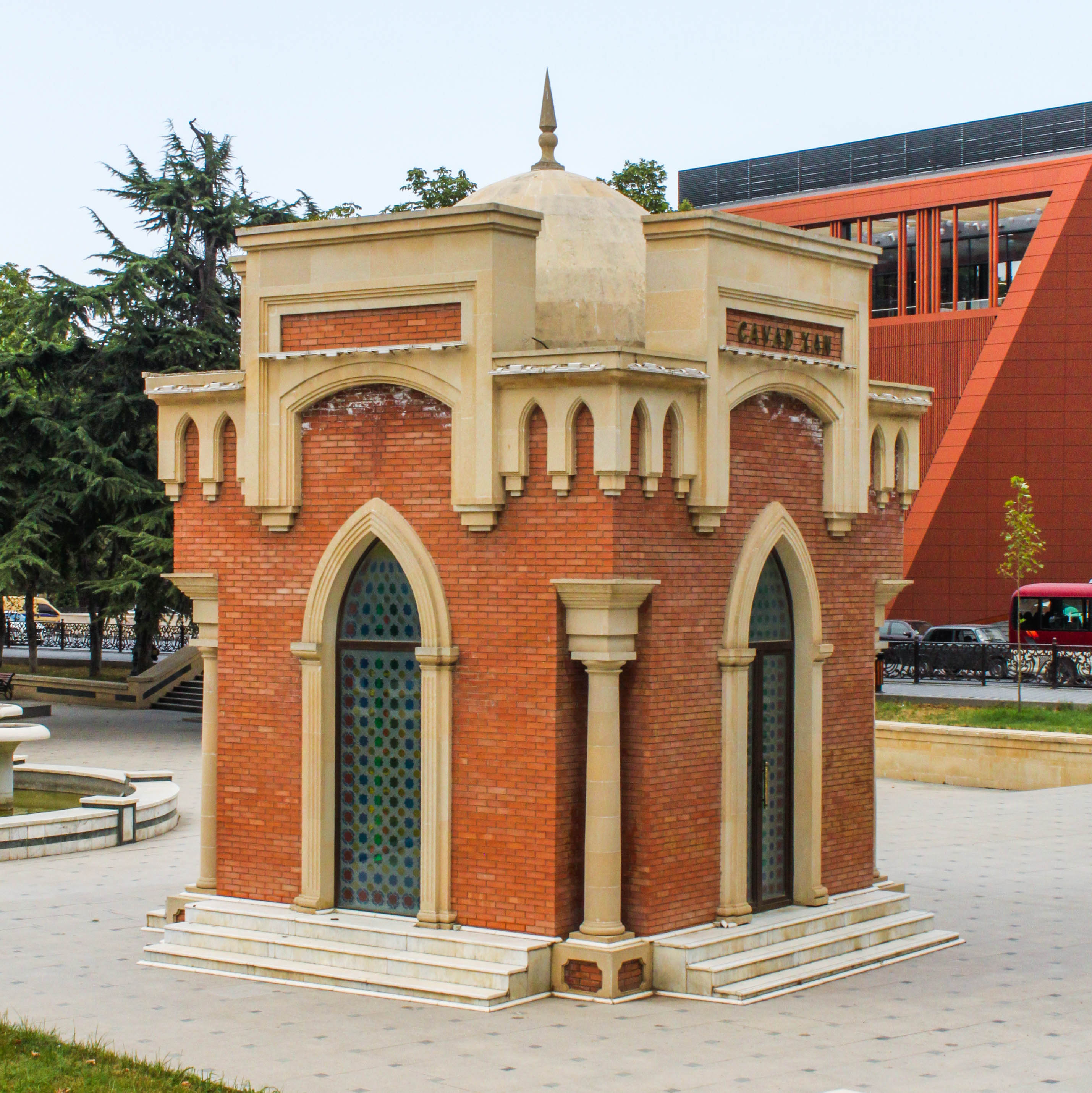 Cavadkan mausoleum